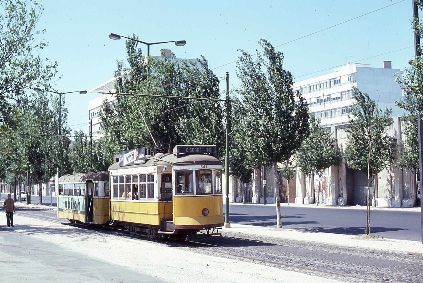 Photo: Trams aux Fils. Prise en 1977 Ligne 15 direction C. SODRE (cette ligne existe encore à ce jour, mais avec des trams modernes) Av. 24 de Julho Tram 542 de la série 532 à 551, il n'existe plus à ce jour, existe encore à ce jour le tram 533 à Kochi (Japon),le tram 535 au musée des trams de Lisbonne, le tram 539 dans un Luna Parc à Penafiel, le tram 546 à Macainhas et le 549 au musée des trams de Lisbonne.